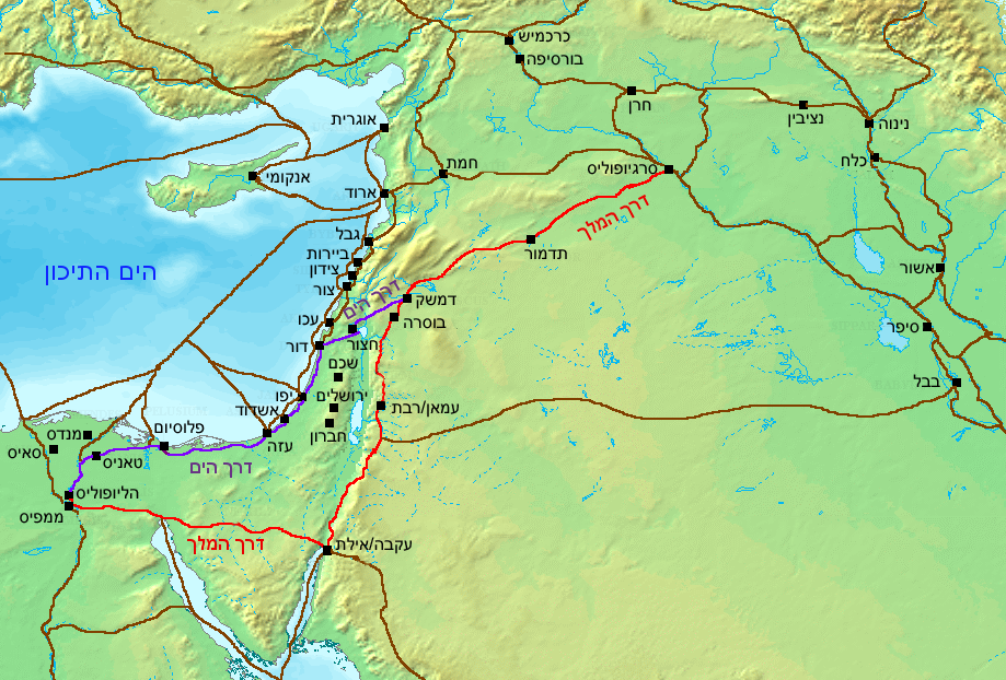 Ancient Levant routes HE